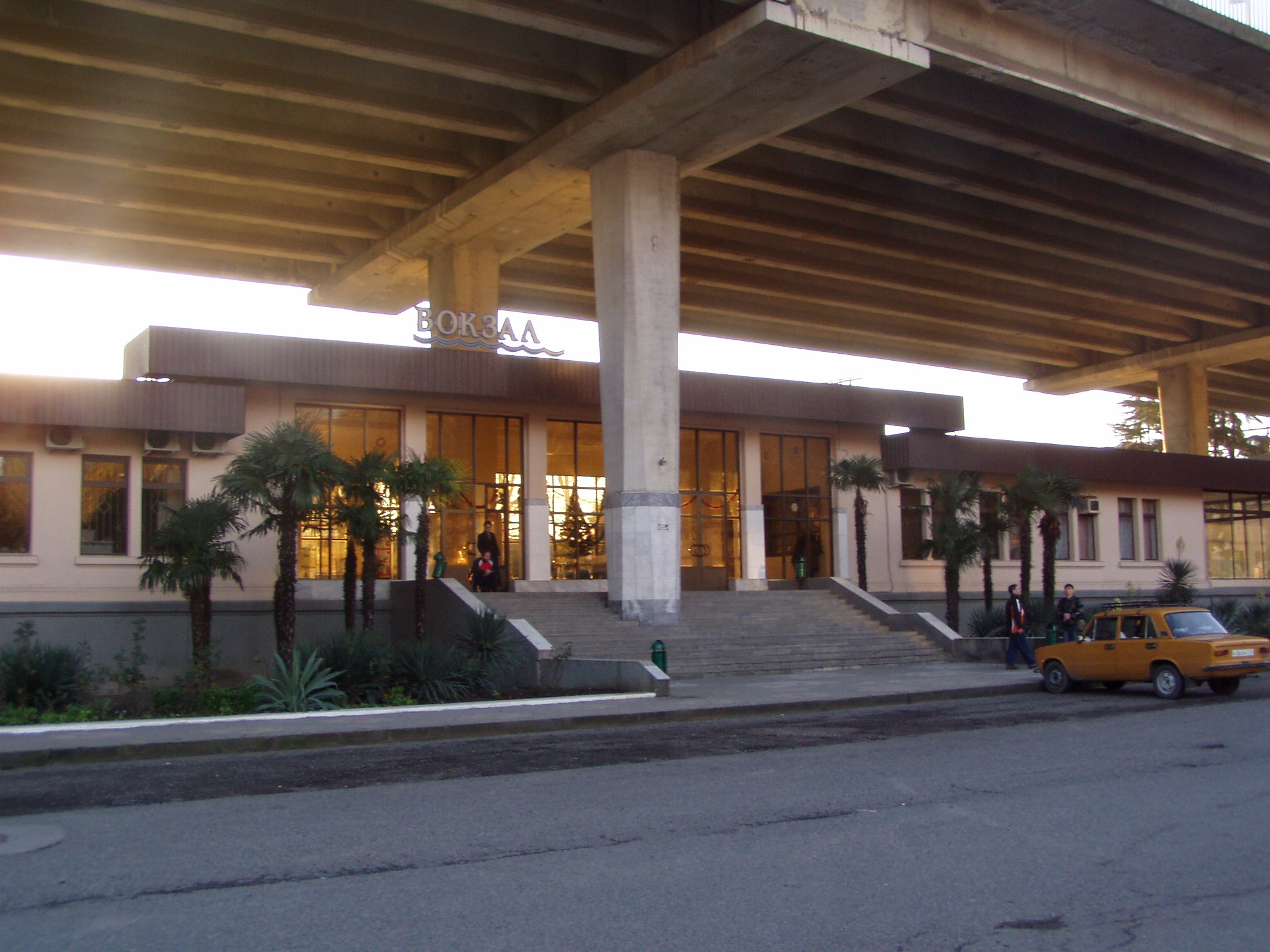 Chosta (Sotschi) Хоста.